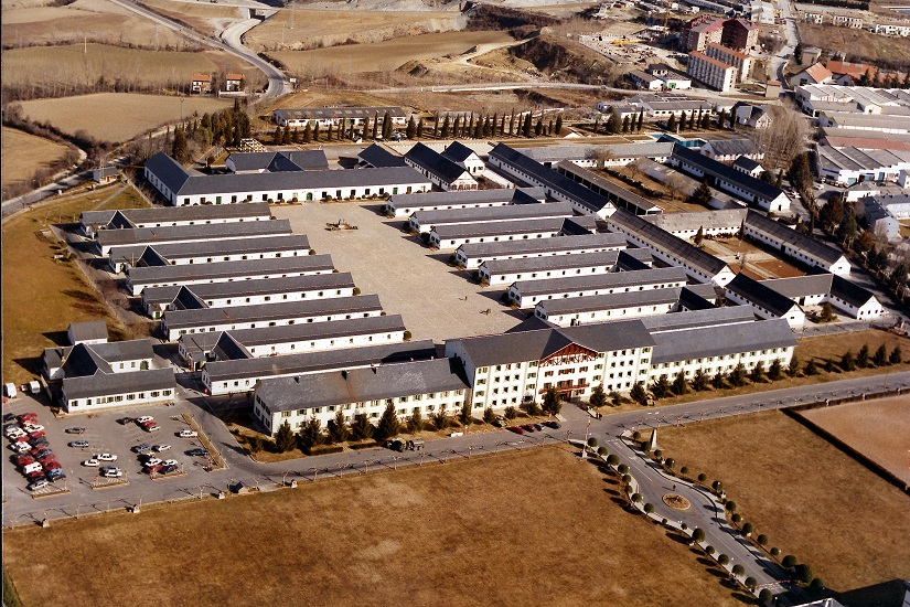 Foto Aerea EMMOE